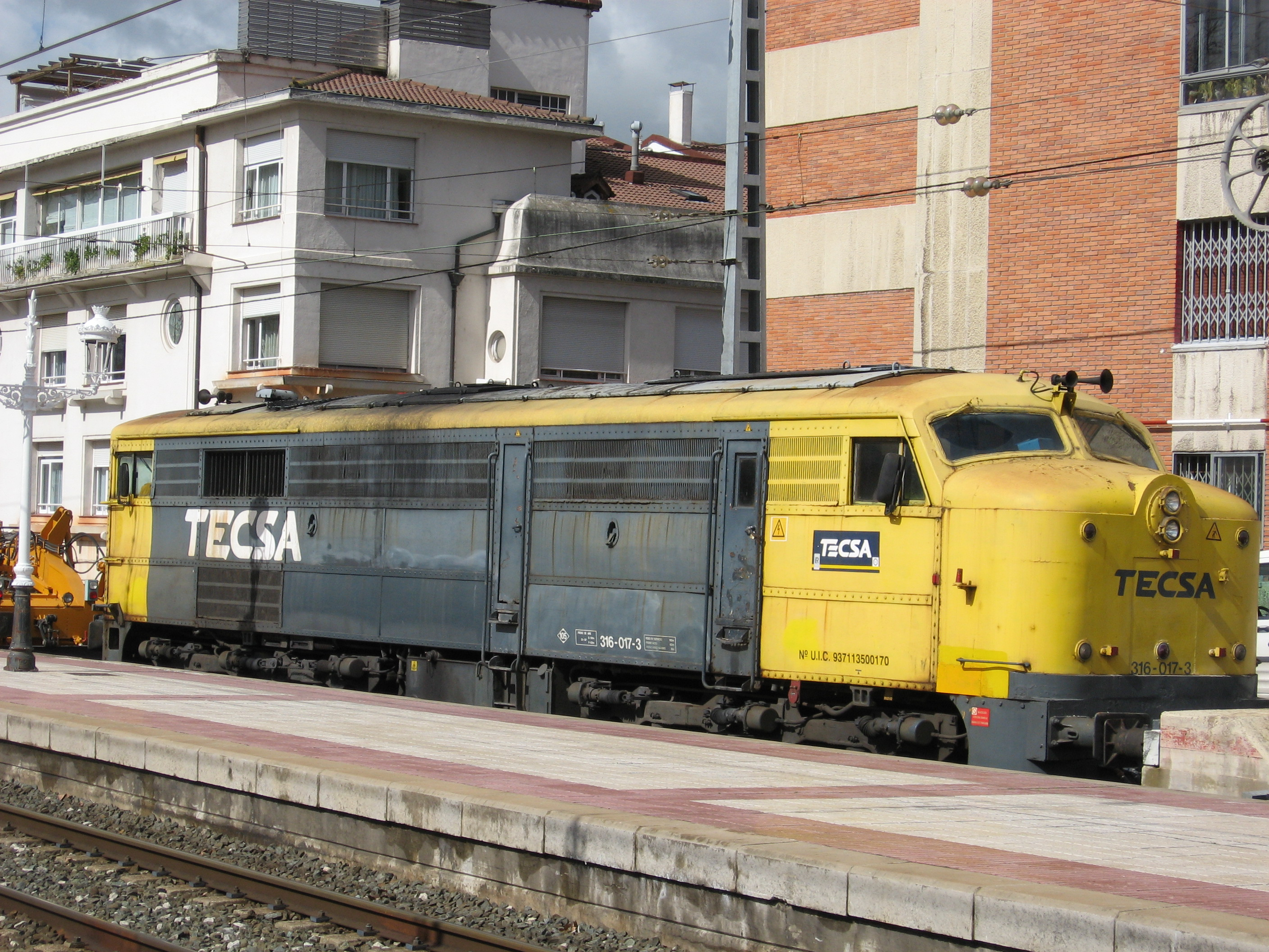 Desc: 316-017 en Vitoria